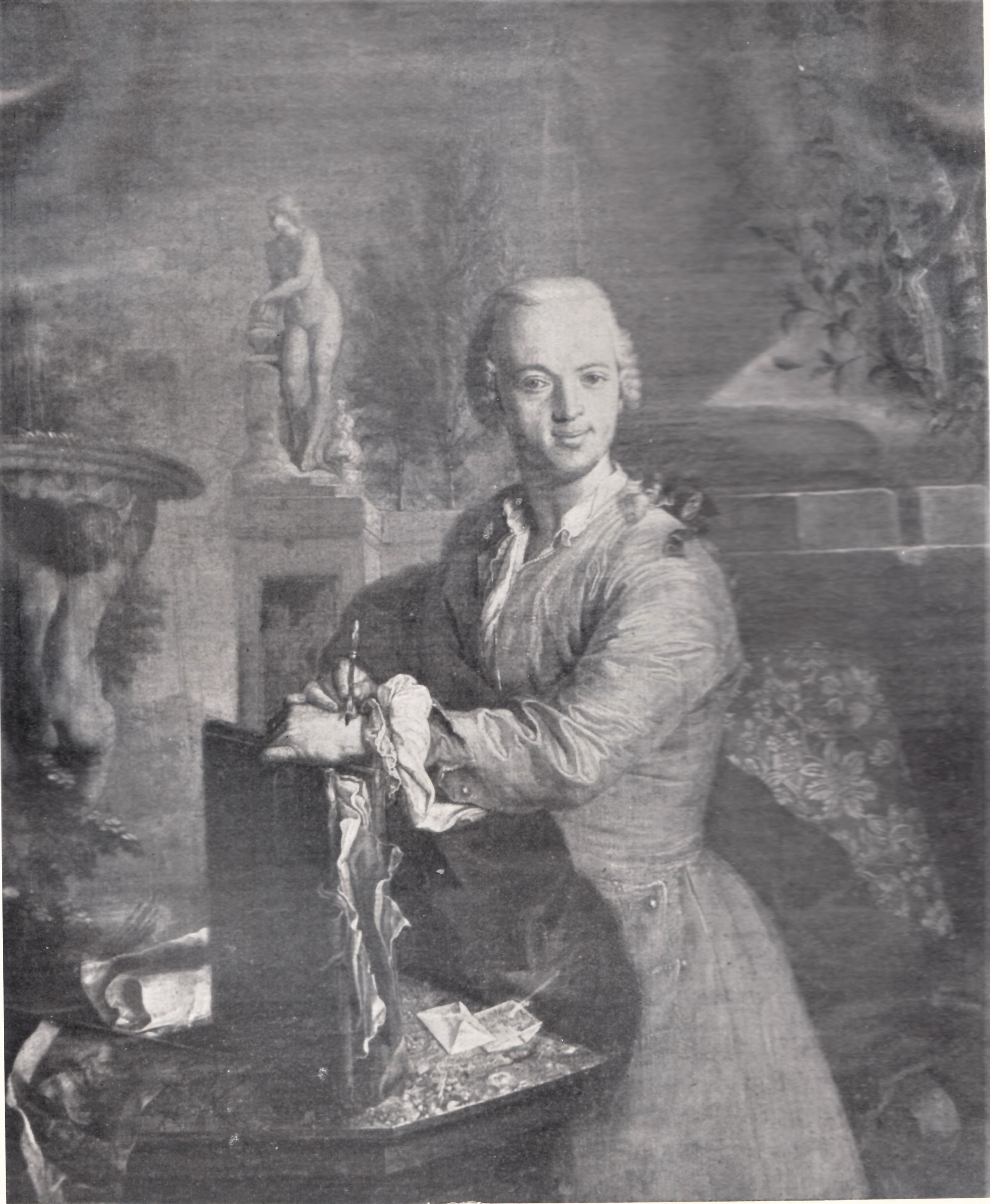 Sebastian Walch (1721–1788): Selbstportät. 1936 im Besitz von Frau Landgerichtspräsident Hermine Walch, Augsburg